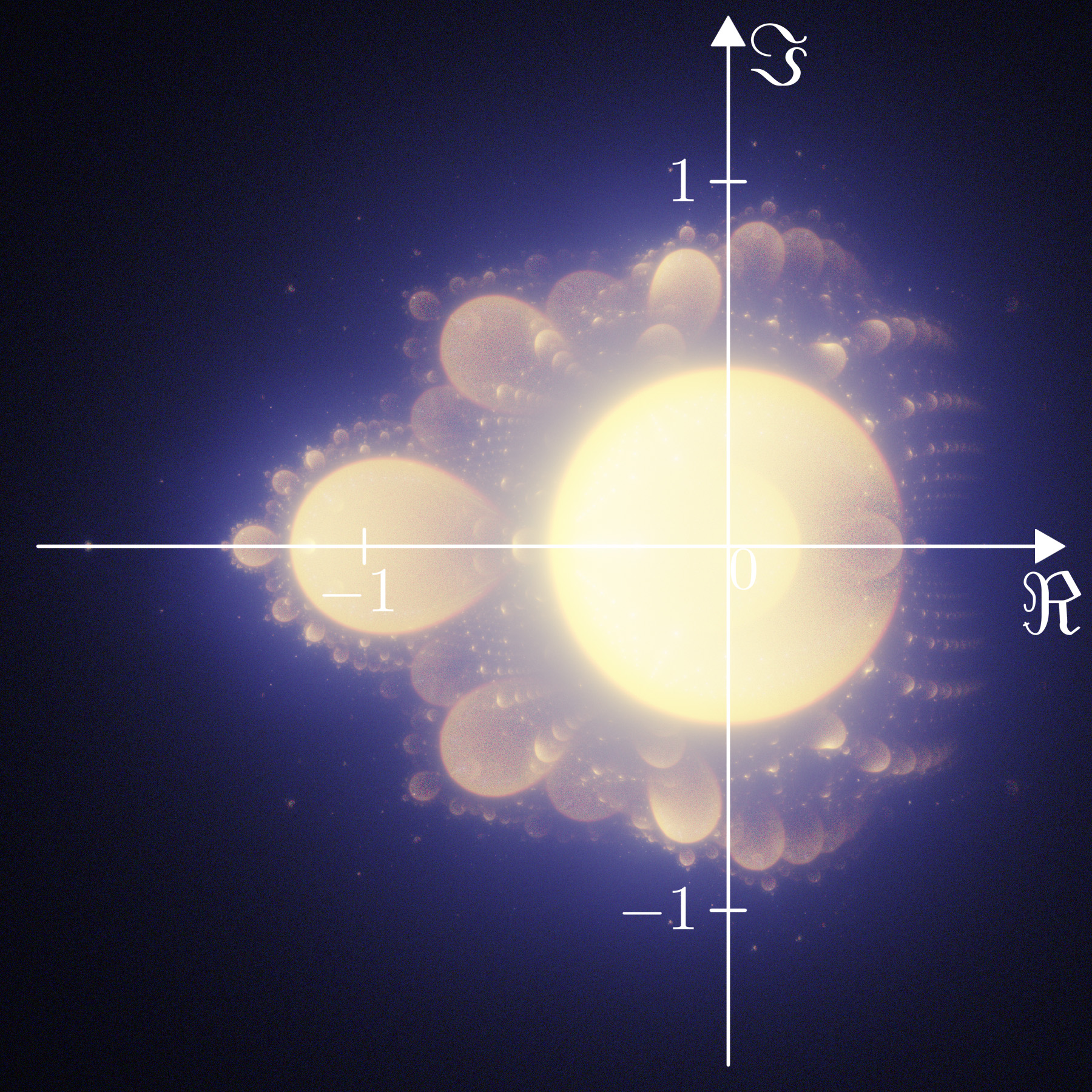 Dichteplot der Trajektorien der Mandelbrotiteration